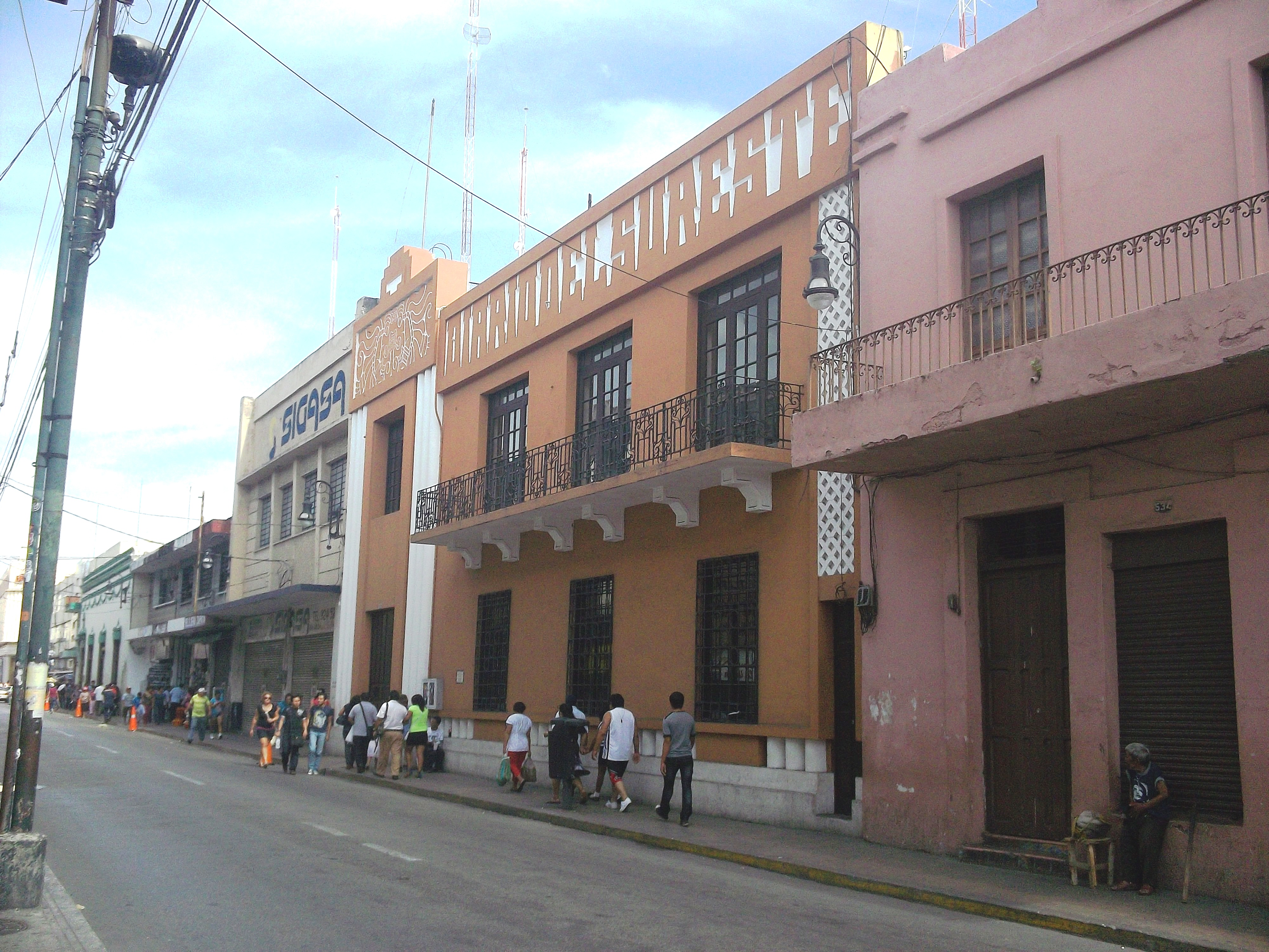 Diario del Sureste en Mérida, Yucatán.